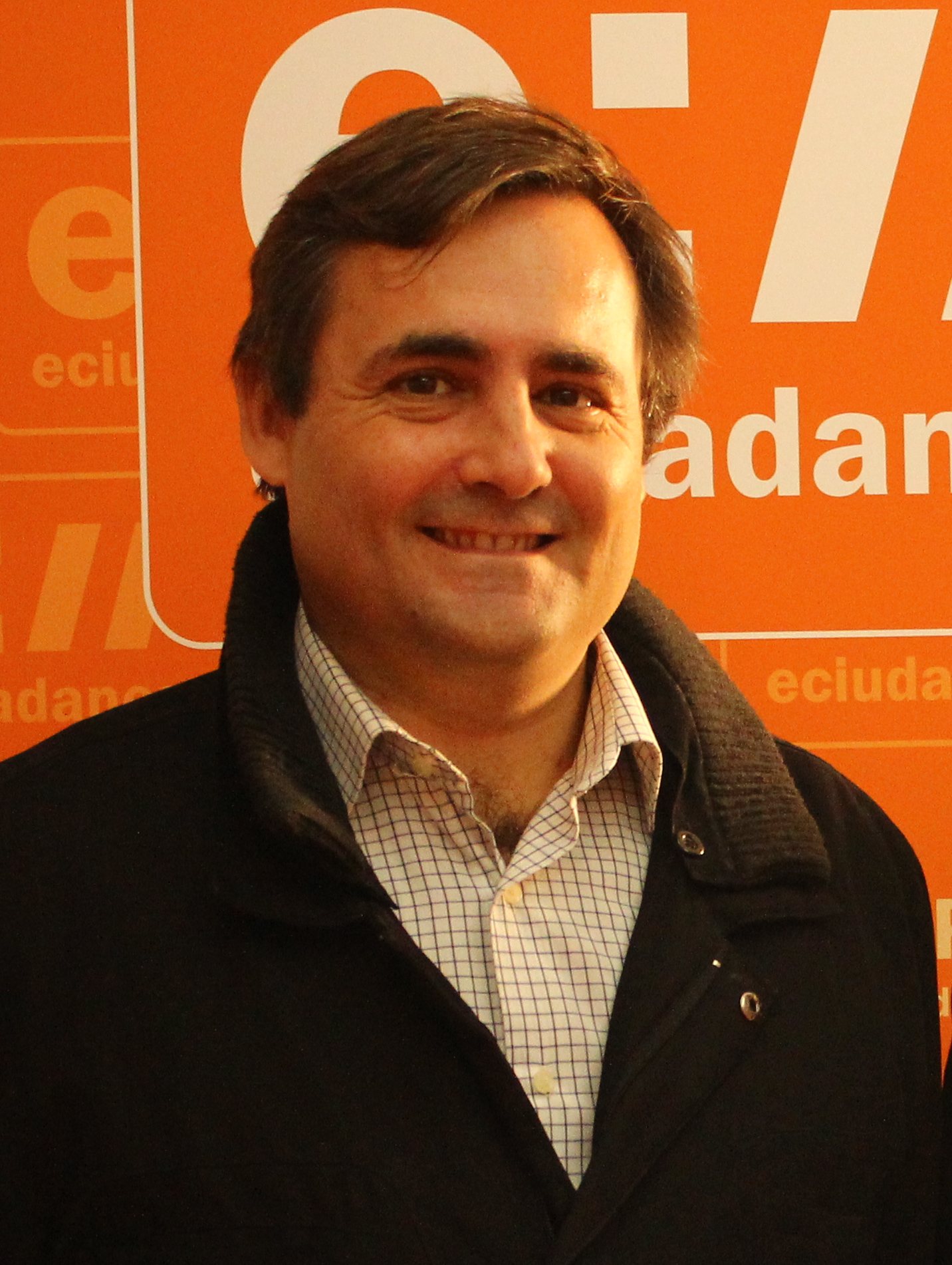 undefined